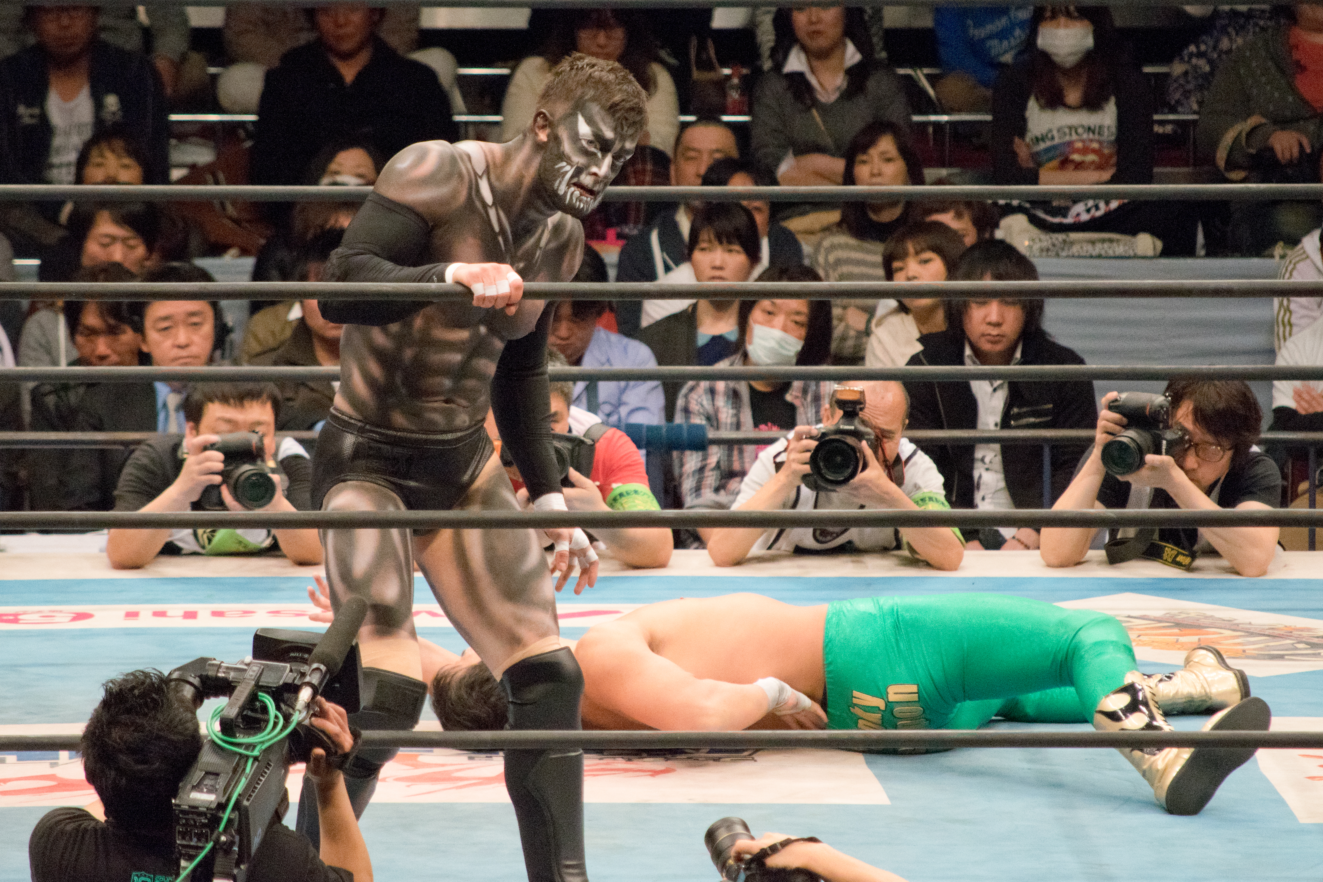 Le catcheur Prince Devitt avec le corps peint durant son dernier combat à la New Japan Pro Wrestling face à Ryusuke Taguchi